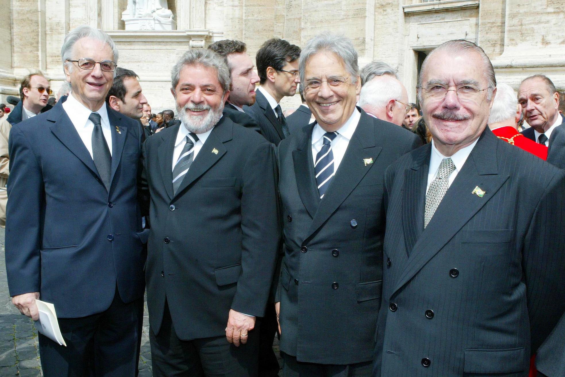 Os presidentes brasileiros Itamar Franco, Luiz Inácio Lula da Silva, Fernando Henrique Cardoso e José Sarney, durante o funeral do Papa João Paulo II, no Vaticano. Ao fundo (à direita), pode ser visto o ex-presidente da França, Jacques Chirac.